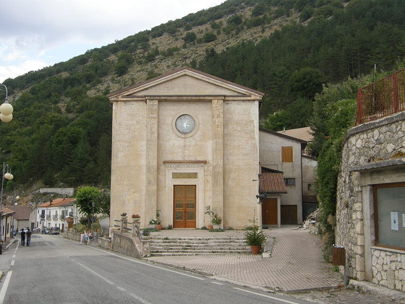 Bisegna